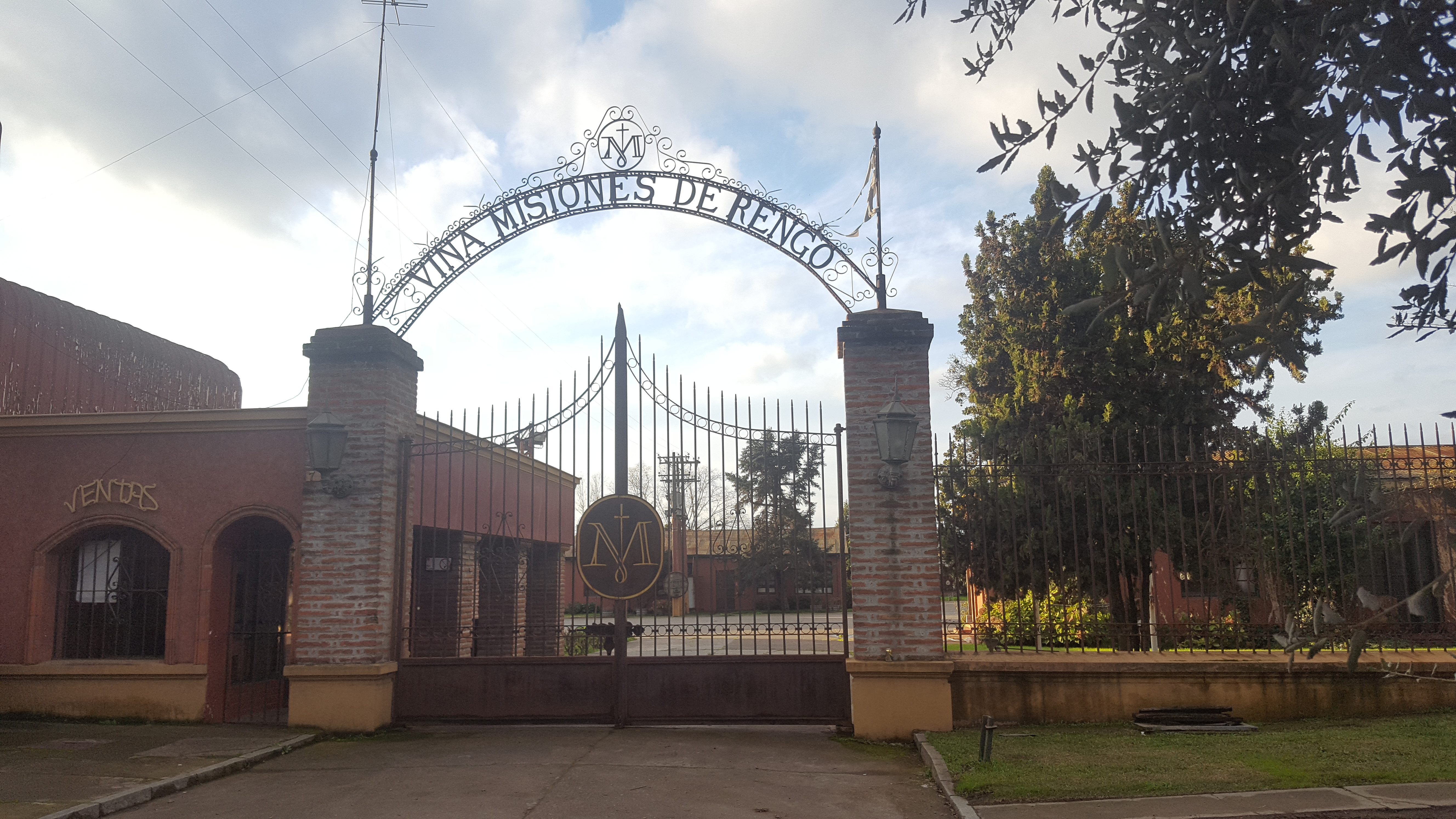 Entrada a la Viña Misiones de Rengo